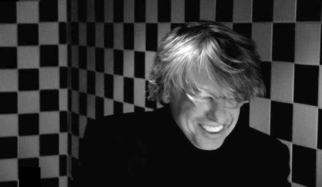 R&S Records label founder Renaat Vandepapeliere in 2012